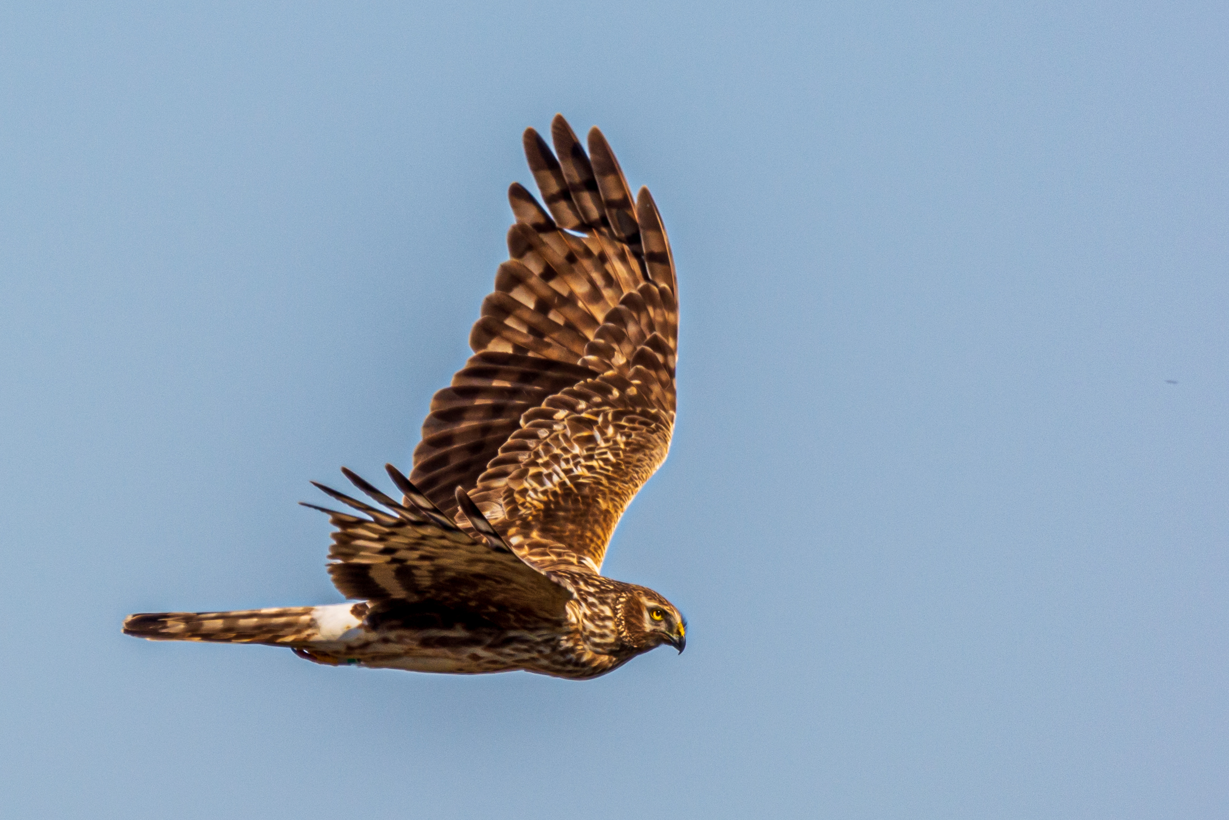 Weibliche Kornweihe (circus cyaneus) - Spiekeroog, Nationalpark Niedersächsisches Wattenmeer